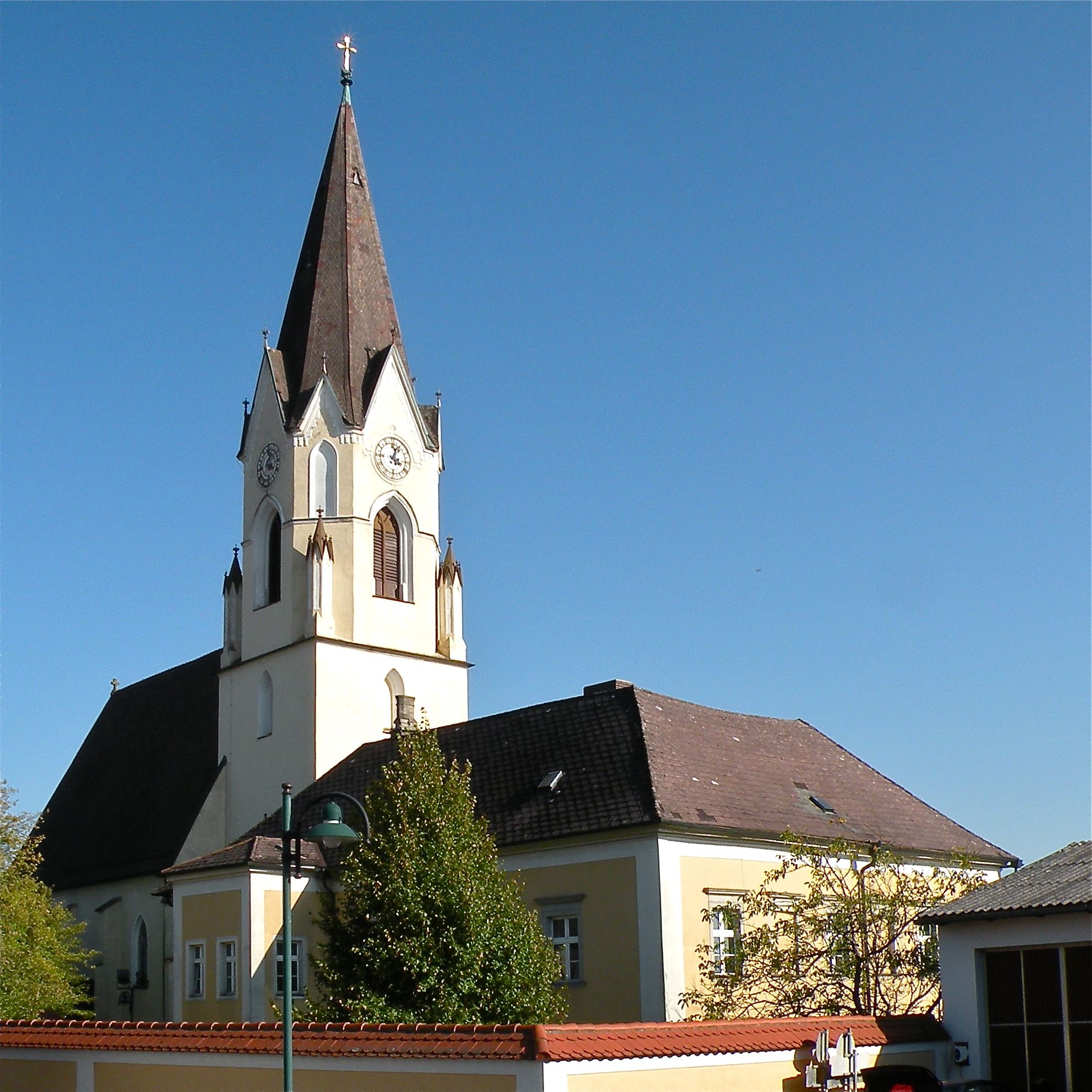 Kath. Pfarrkirche Hl. Remigius